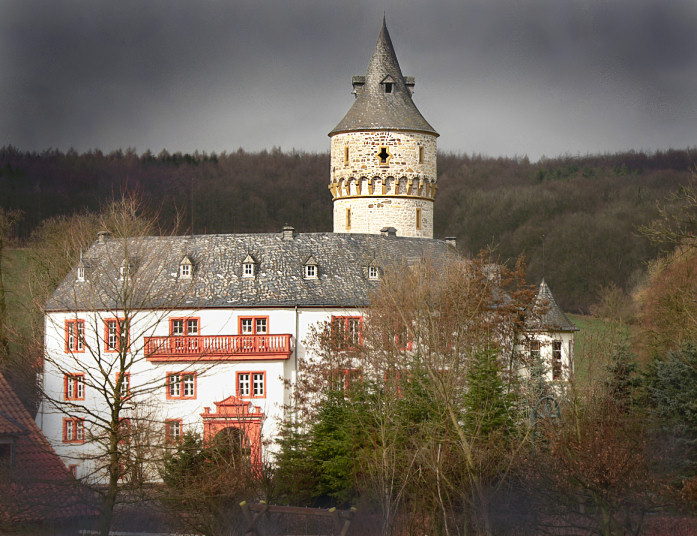 Schloss Oelber am weißen Wege mit dunklem Waldhintergrund, der dem Schloss im Film Das Spukschlosss im Spessart eine Spessart-Atmosphäre verlieh. Foto aufgenommen von Benutzer Benutzer:AxelHH, April 2006